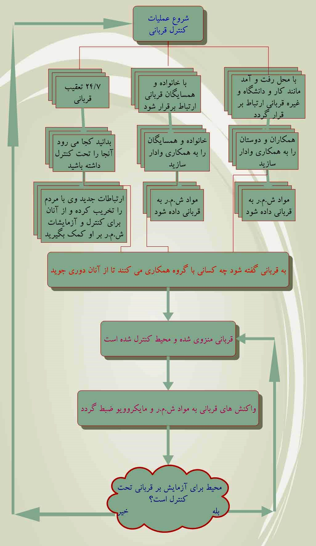 فلوچات کنترل با مواد شیمایی